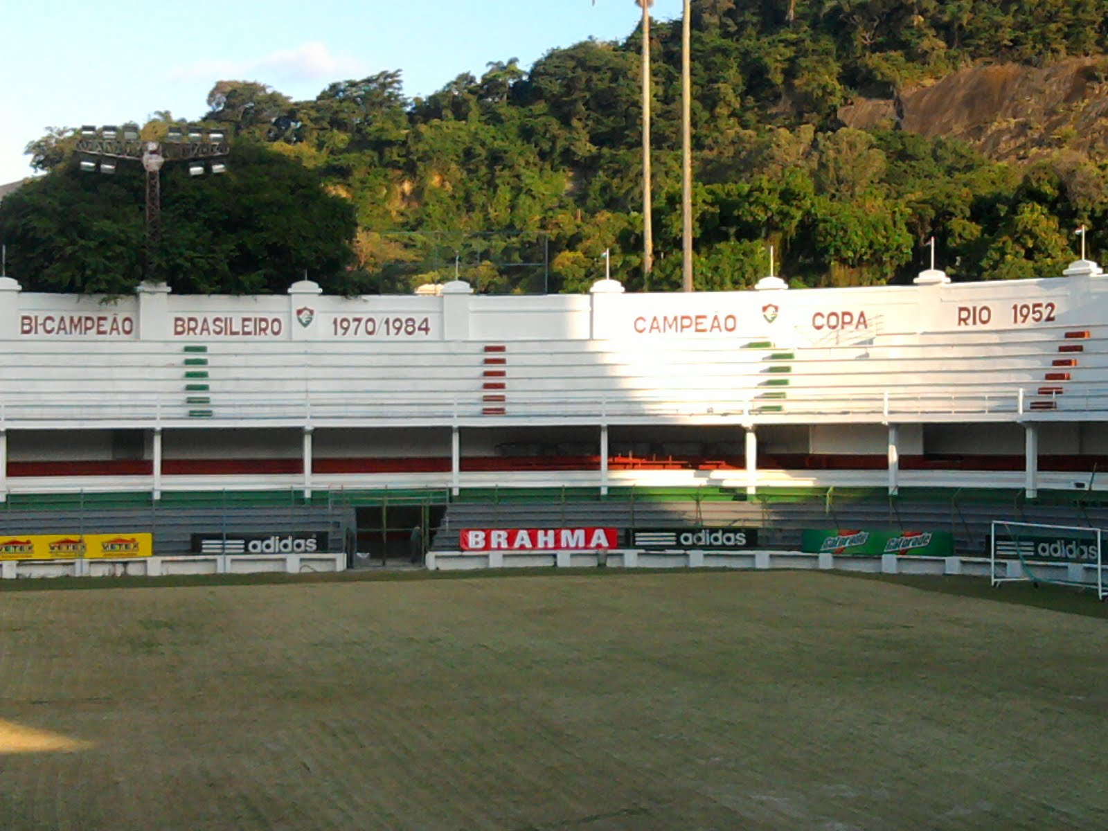 Estádio Manoel Schwartz.